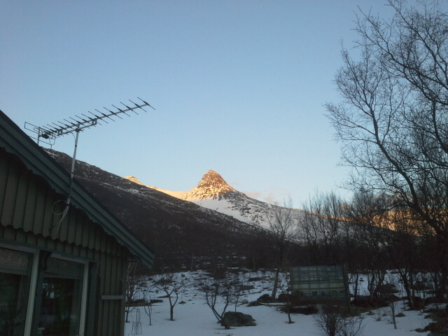 Smaltind vinter 2014